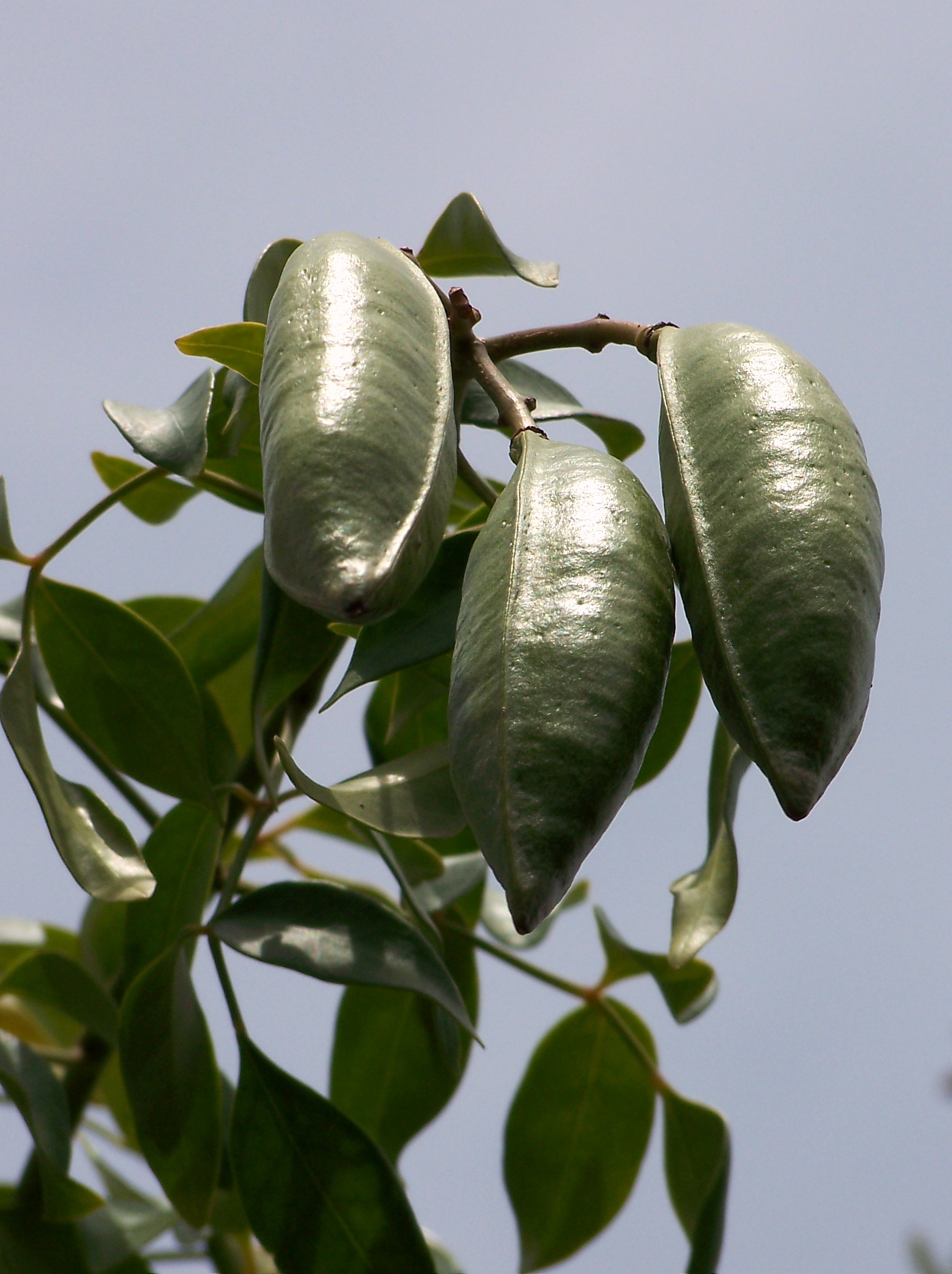 Pandorea jasminoides (Lindl.) K.Schum. (Bignonia blanca) - Frutos inmaduros - Cultivado/ornamental, Urbanización Monte Pinar, Orihuela (Provincia de Alicante, España)